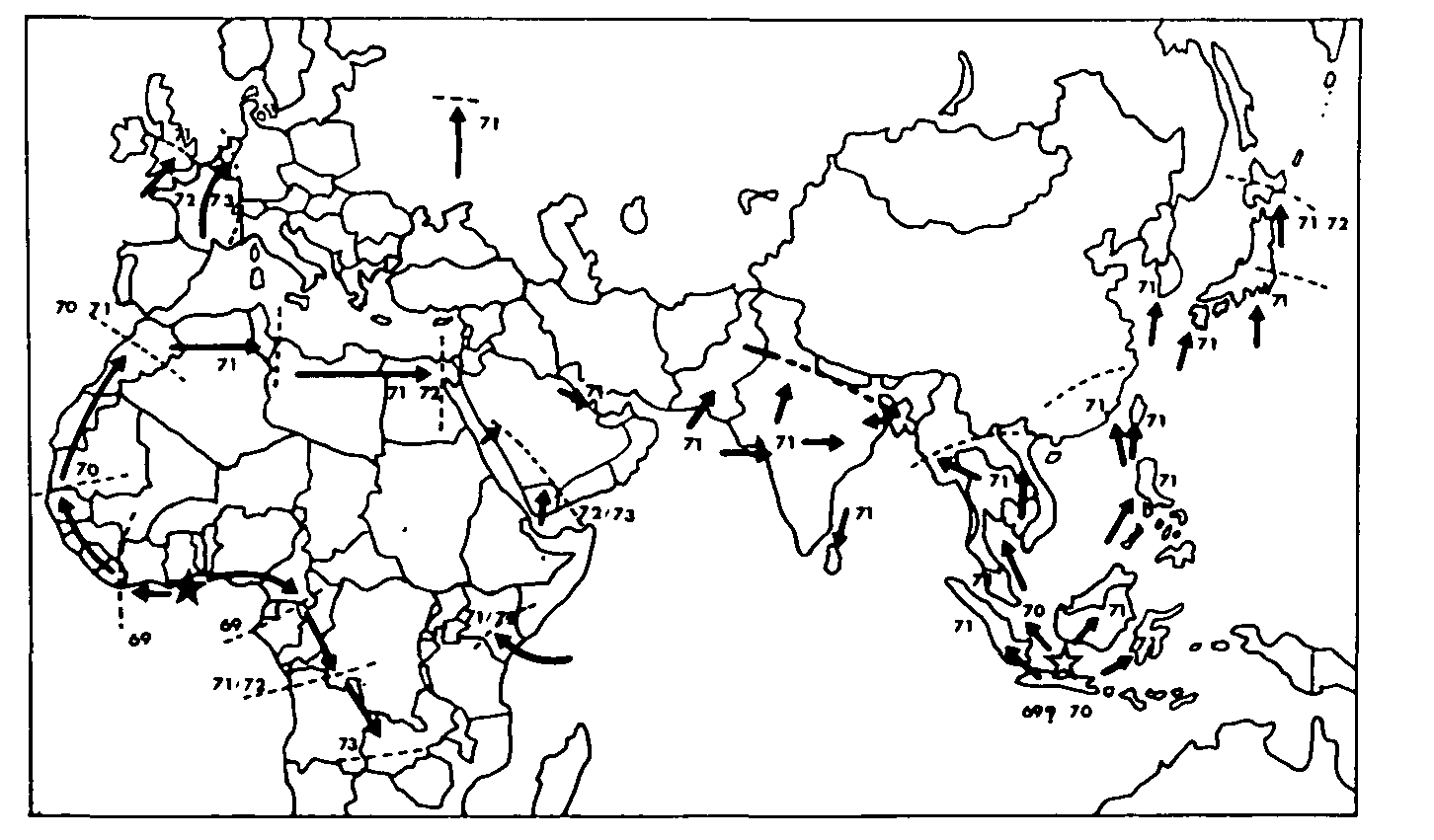 תרשים המתאר את התפשטות המחלה בעולם בין מדינות